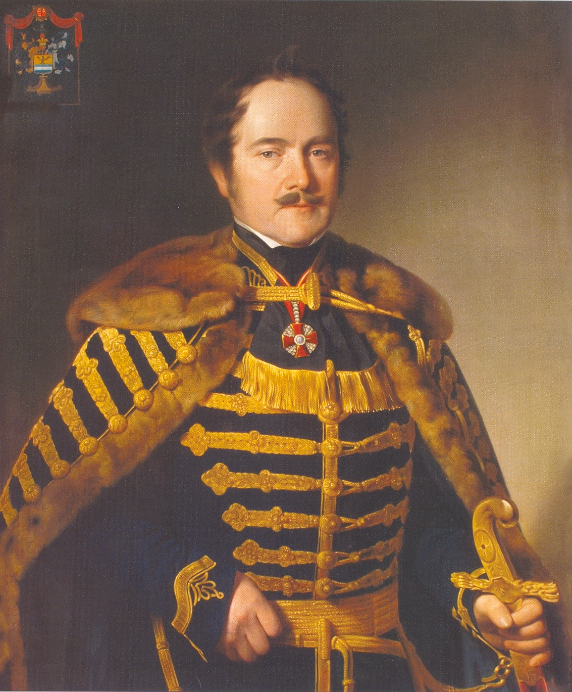 Svajczer Gábor geológus, bányamérnök, főkamaragróf, tanár.